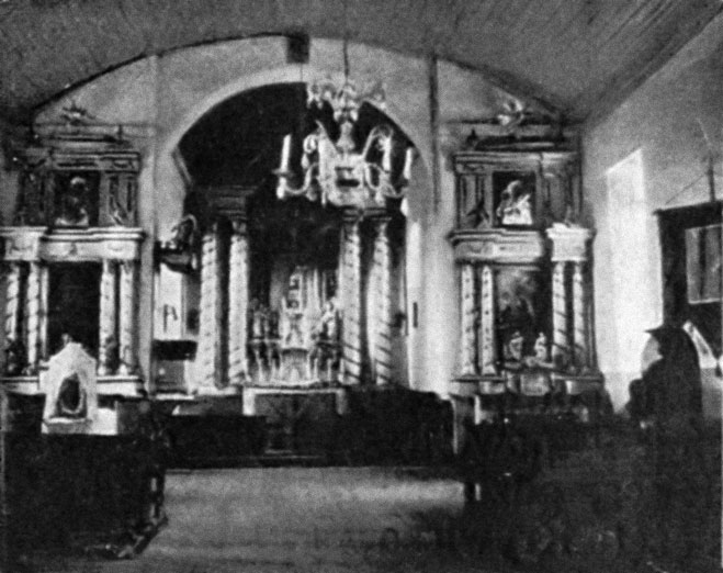 Беларуская (тарашкевіца): Радамля (Radamla), інтэр'ер касьцёла